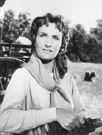 Fotografía blanco y negro, sobre papel fotográfico brillante con marco perimetral, de una escena del film "Campo arado", con la actriz Silvia Legrand, de medo cuerpo y en un exterior. Con el cuerpo de tres cuartos de perfil derecho y el rostro de frente, viste una camisa rayada de mangas largas y pañuelo al cuello. Sostiene con sus manos y brazos, una damajuana. Detrás, a la izquierda, un carro y al fondo, un monte de árboles.Depicted person: Silvia Legrand – Argentine actress